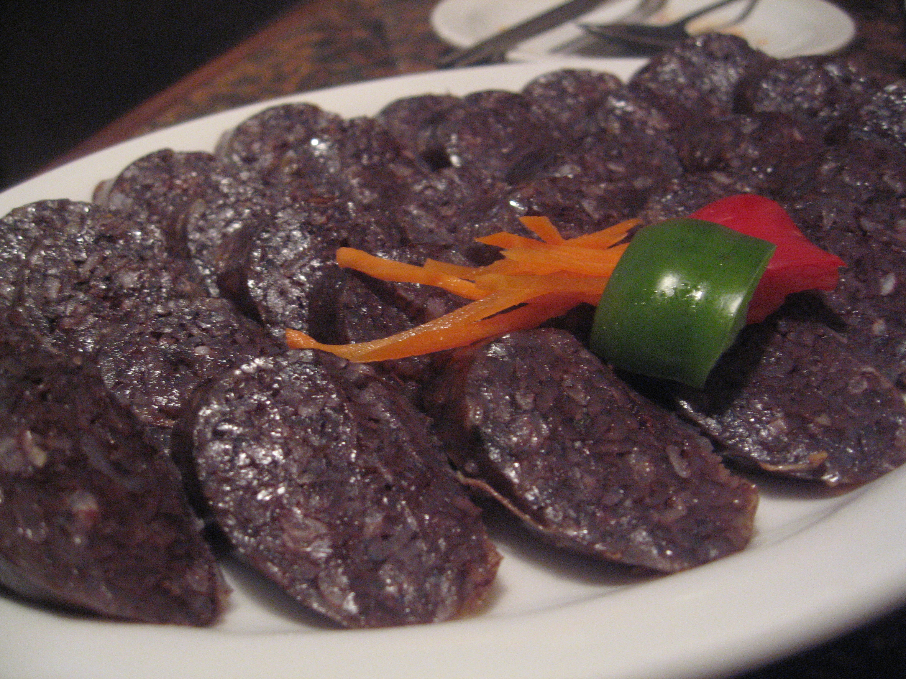 Blood sausage @ CKR